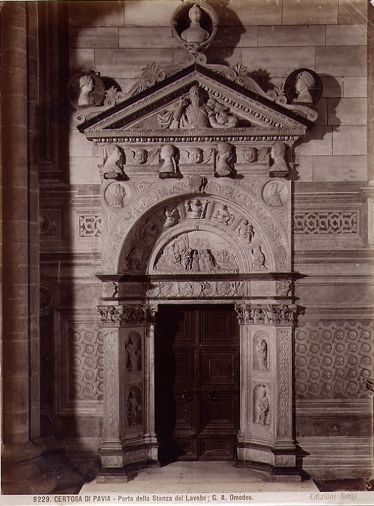 Brogi, Carlo (1850-1925), "Certosa di Pavia - Porta della stanza del lavabo, G. A. Omodeo" (con i ritratti di profilo dei componenti della famiglia Sforza). Numero di catalogo: 8229.